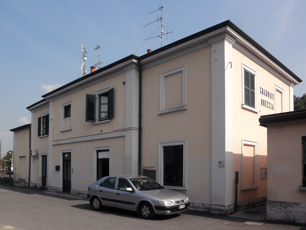 Stazione ferroviaria di Grandate-Breccia.